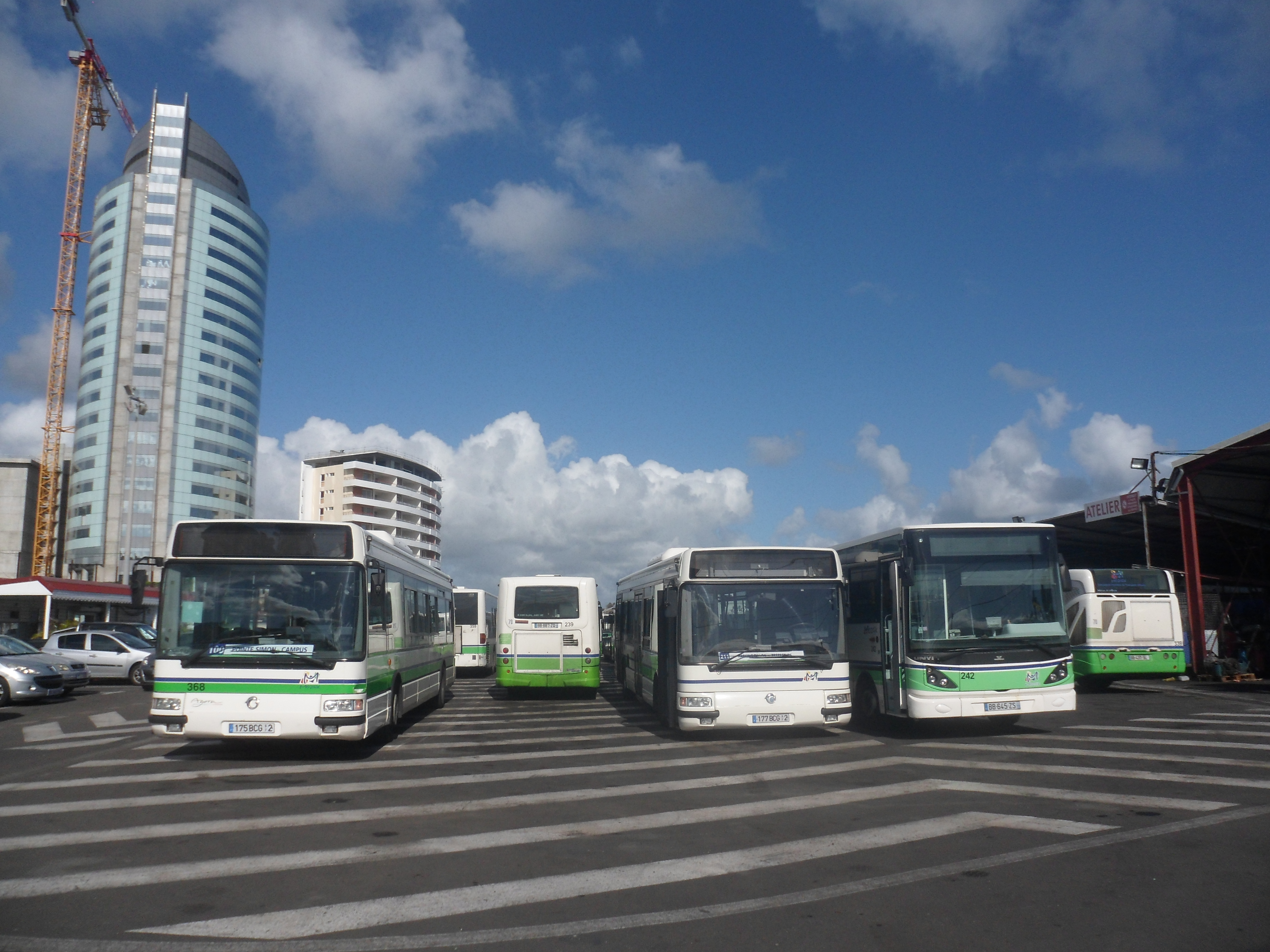 Le dépôt du réseau Mozaïk, à Fort-de-France, en Martinique.